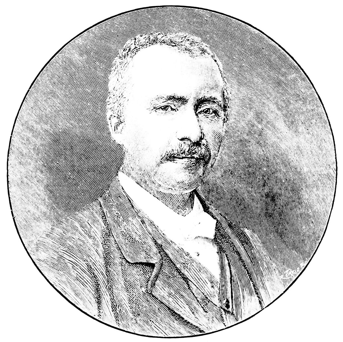 Henry T Schliemann